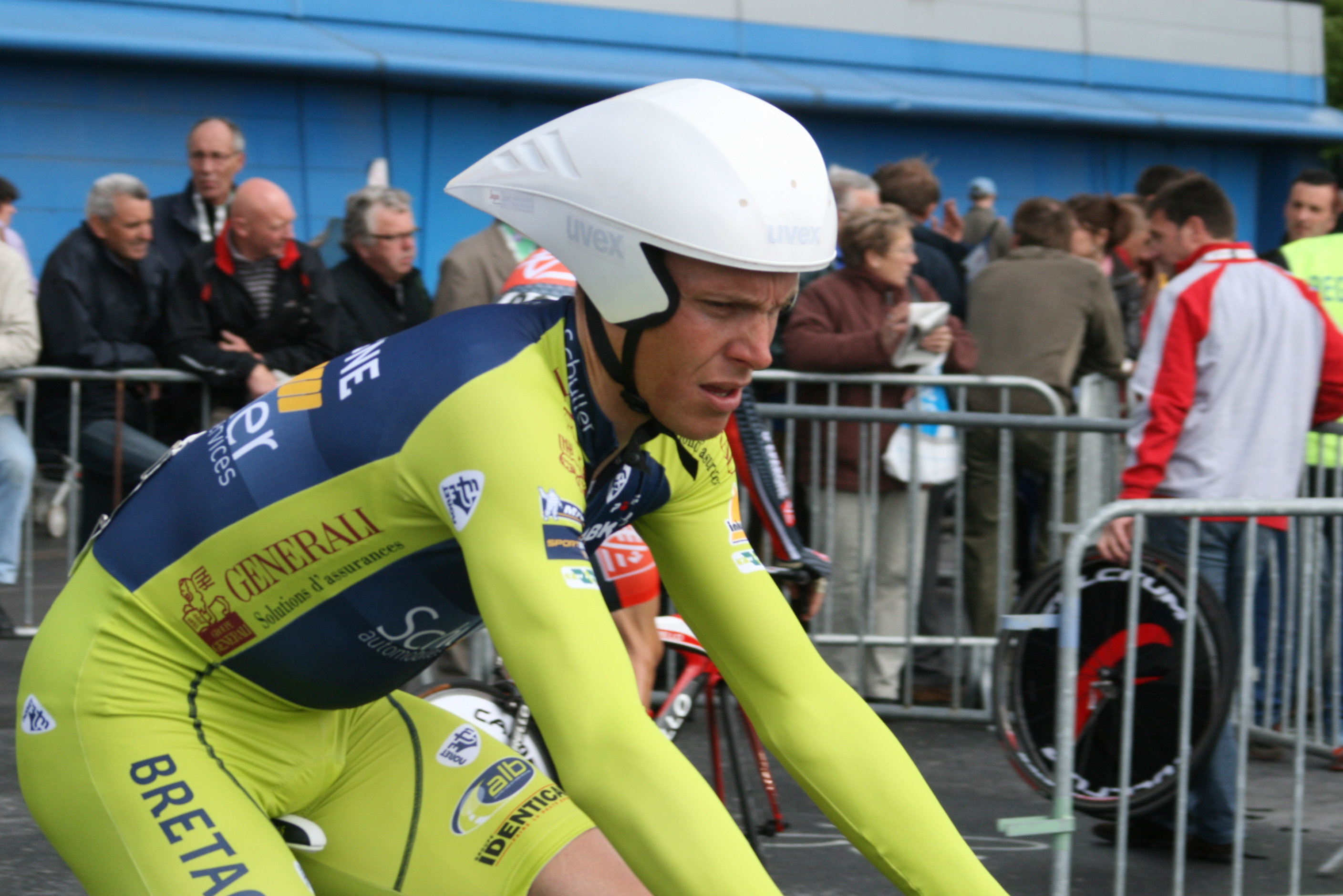 Lilian Jegou, durant les Quatre jours de Dunkerque 2009, à Douai